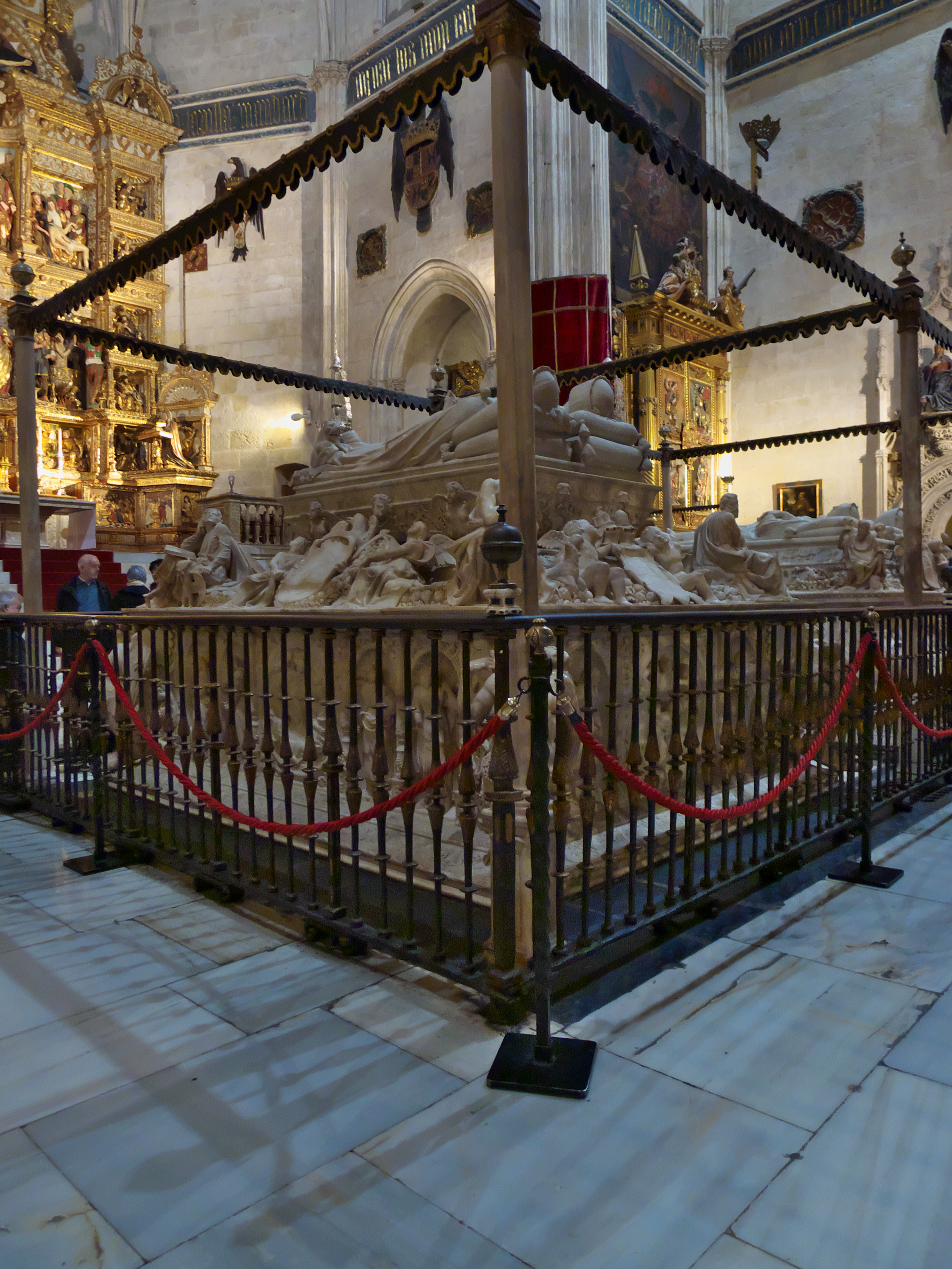 Capilla Real de Granada. Sepulcro tallado en mármol de Carrara (1517) por Domenico Fancelli que sigue el modelo del sepulcro del príncipe Juan de Aragón (Ávila) (1511-512)